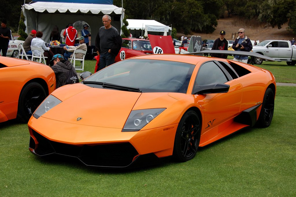 Lamborghini Murcielago SV